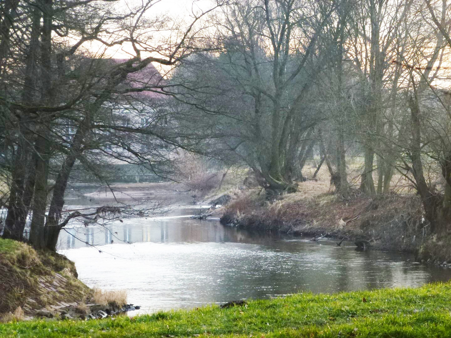 Zwickauer Mulde in Waldenburg; Flussabschnitt im FFH-Gebiet DE-4842-301 „Mittleres Zwickauer Muldetal“.